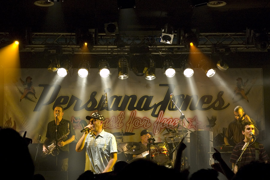 1000° show!